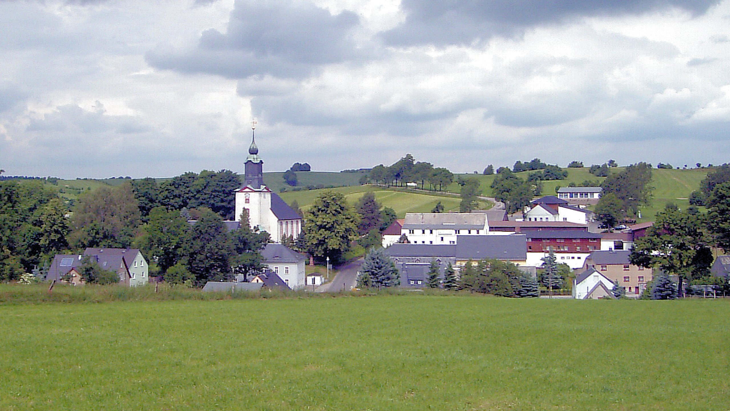 Blick auf den Oederaner Ortsteil Gahlenz